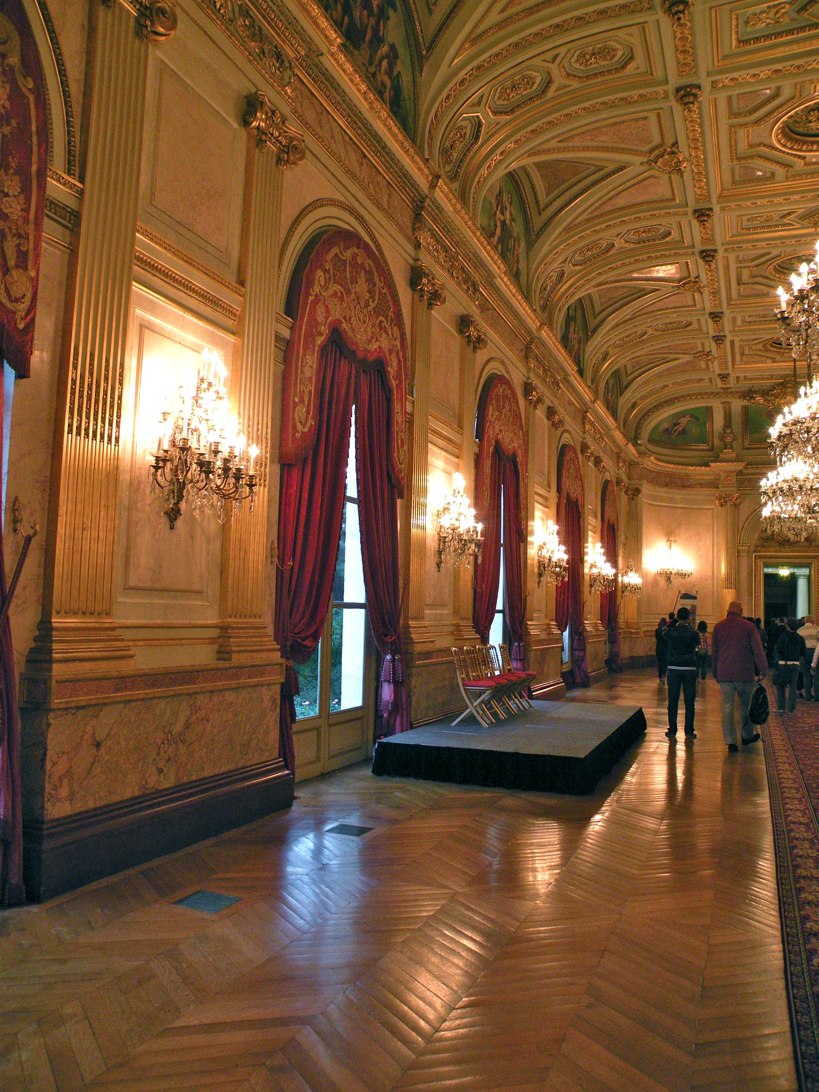 salle des fetes du Palais Bourbon